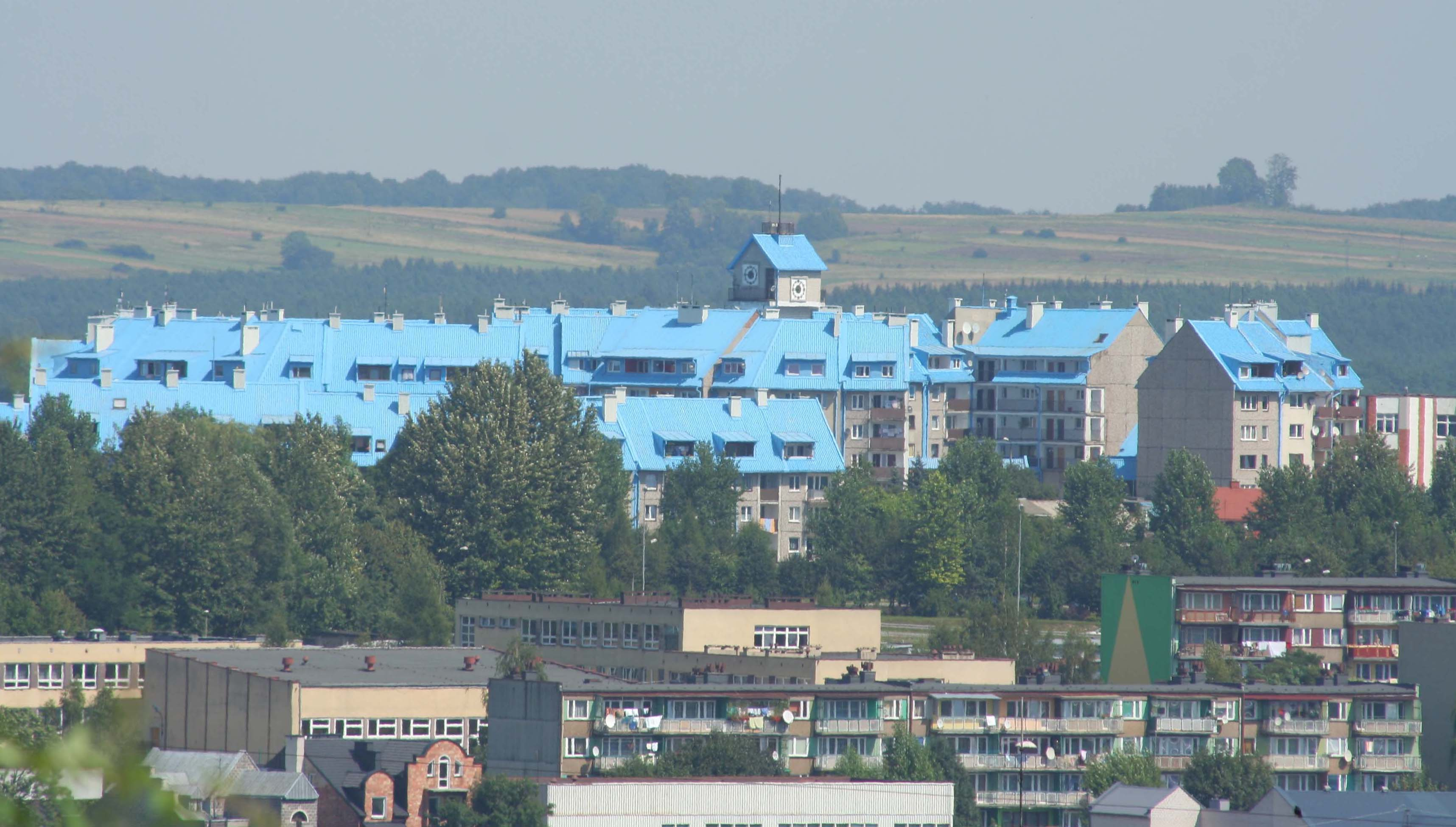 połowa Osiedla Słowiki w Olkuszu